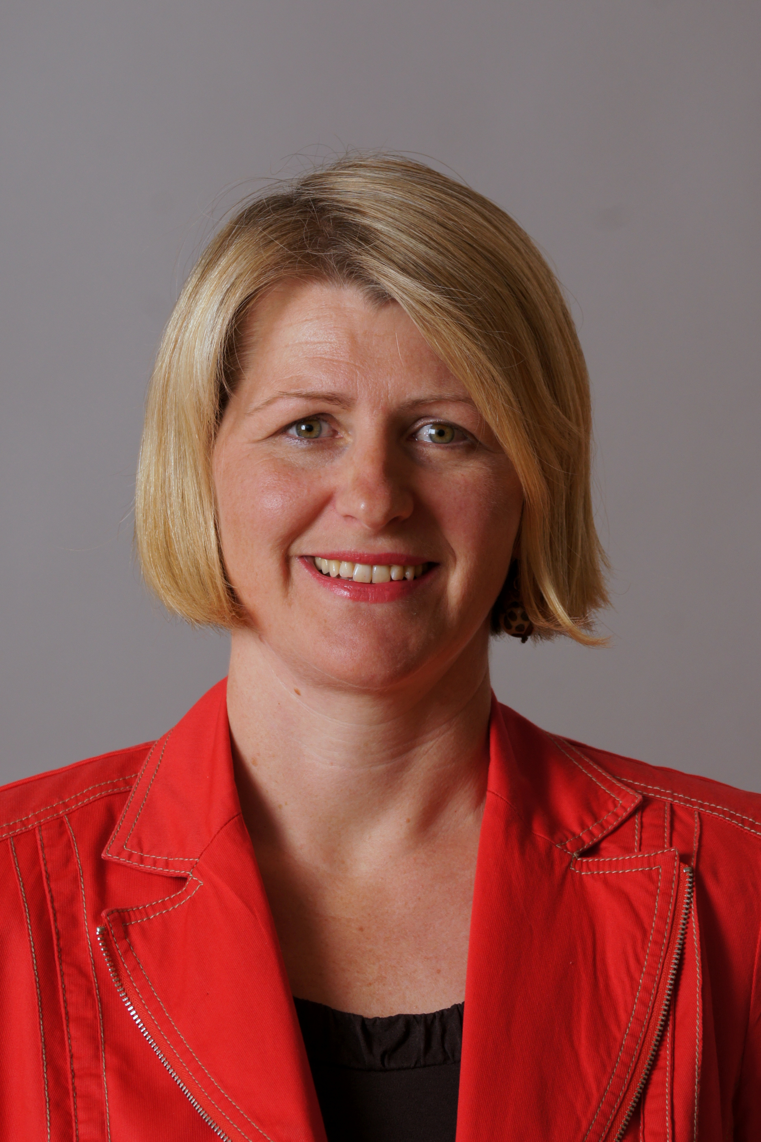 Karin Scheele, Abgeordnete zum NÖ Landtag.